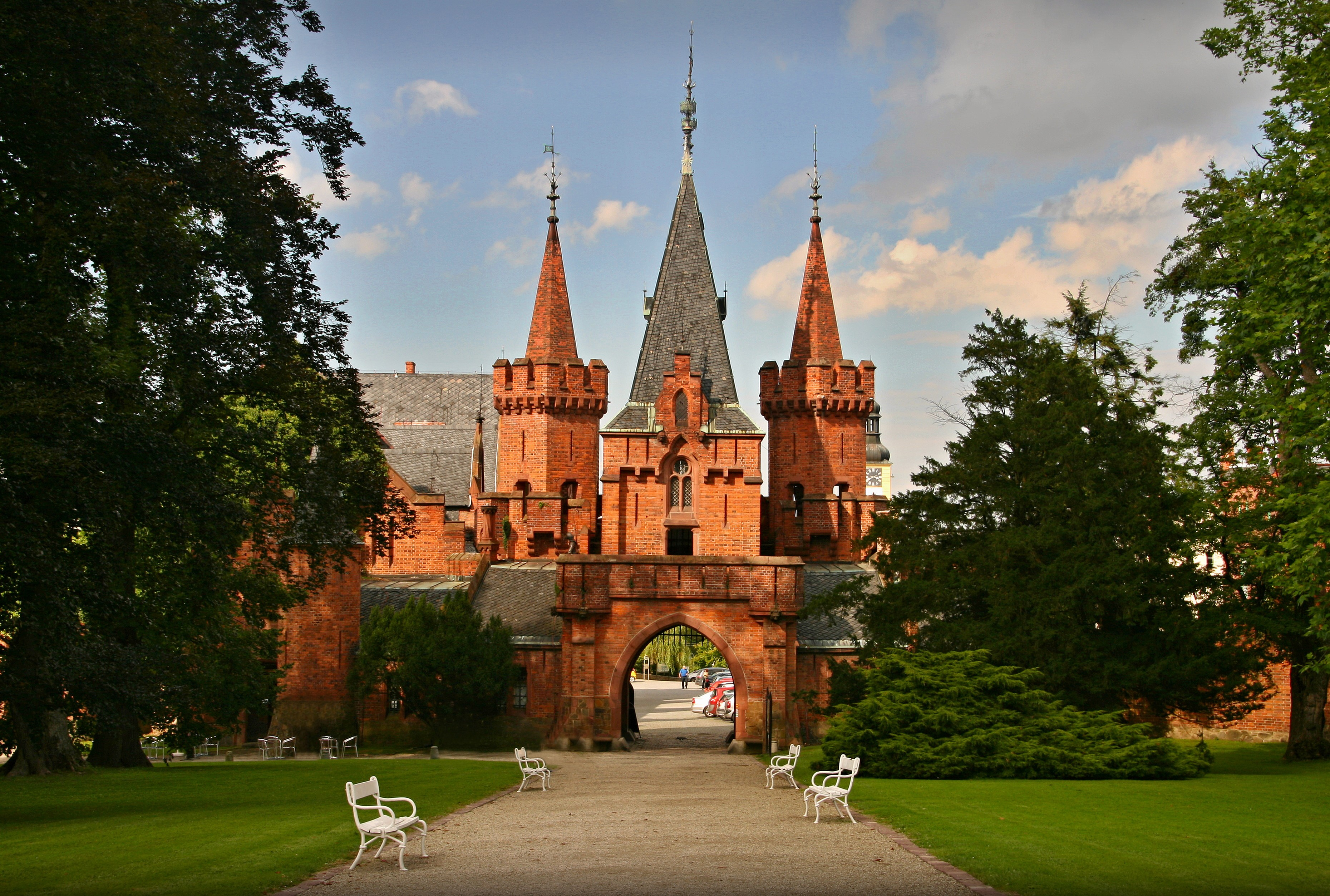 Zámek Hradec nad Moravicí, náměstí Československé armády 1, Hradec nad Moravicí.